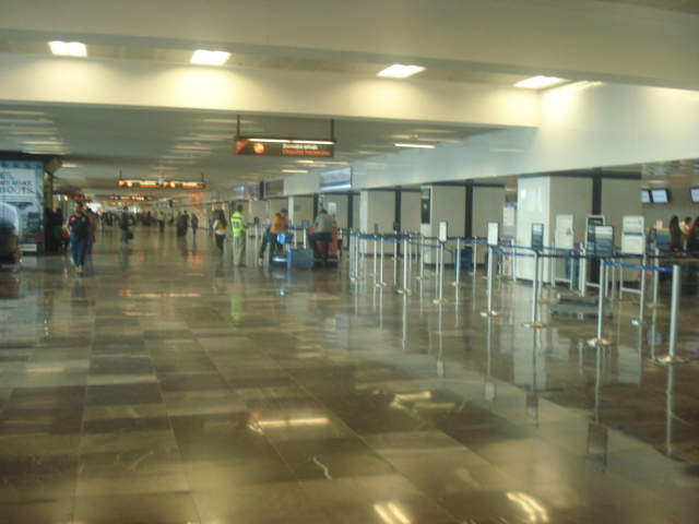 Terminar 2 del Aeropuerto